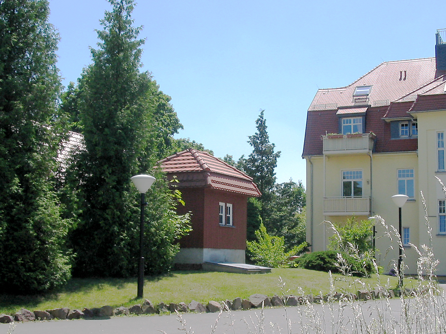 Radebeul, Brunnenhaus Kurhaus Wettin